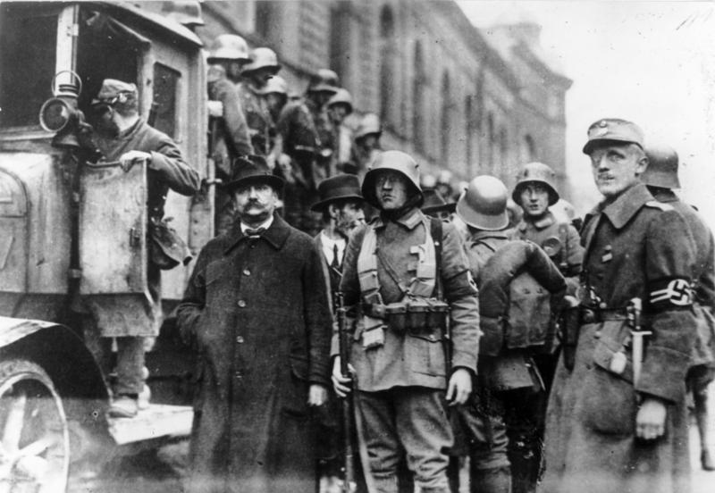 Hitler Putsch (8.-9.11.1923). - Stoßtrupp Hitlers verhaftet sozialistische Stadträte